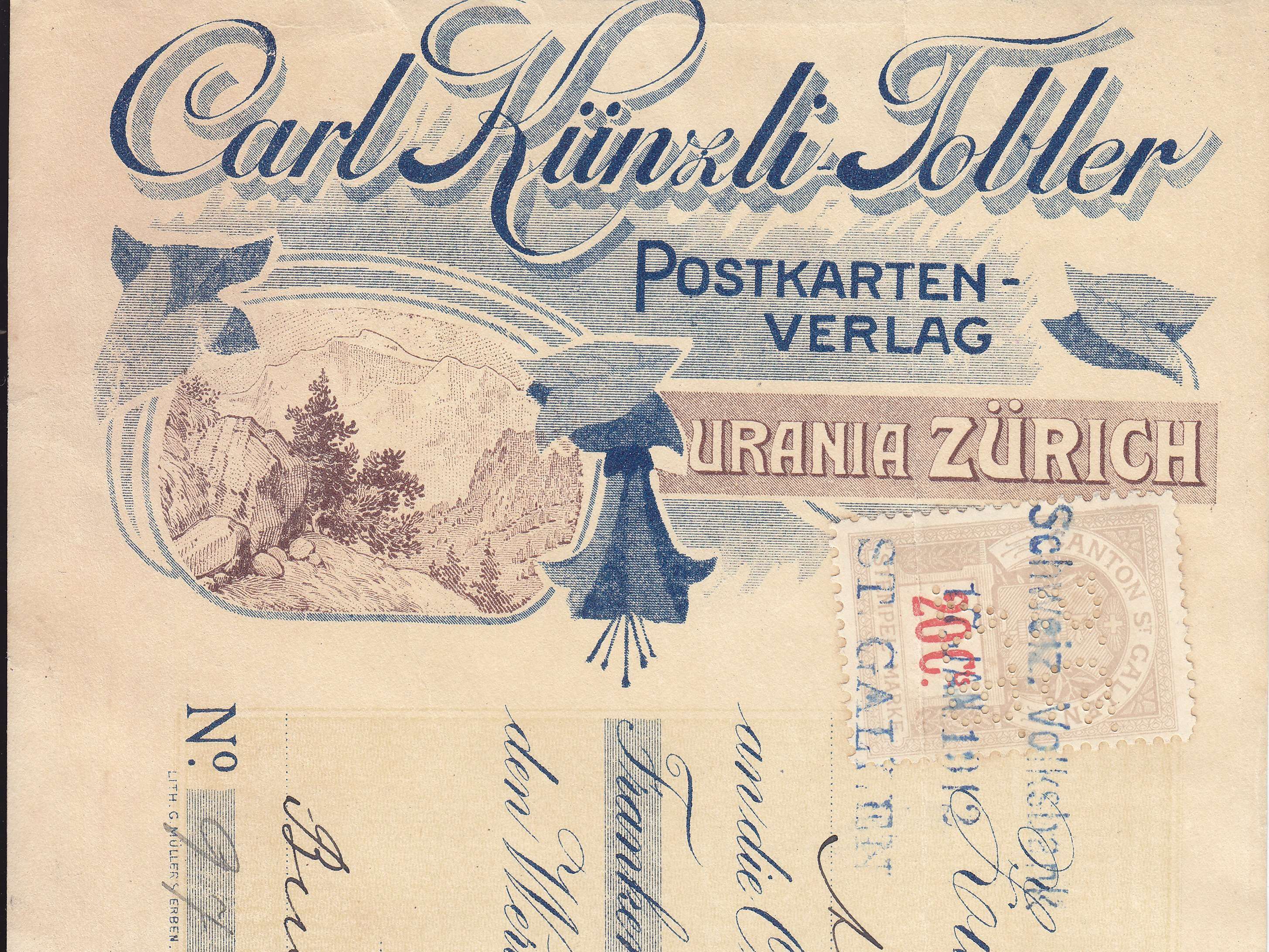 Bankchecke des Postkarten-Verlags von Carl Künzli-Tobler, Zürich, aus dem Jahr 1912.